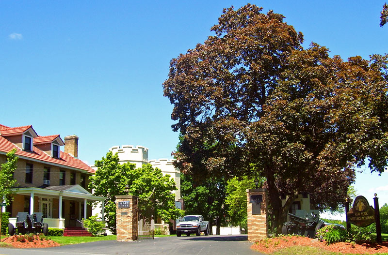 Académia militar de Nova York